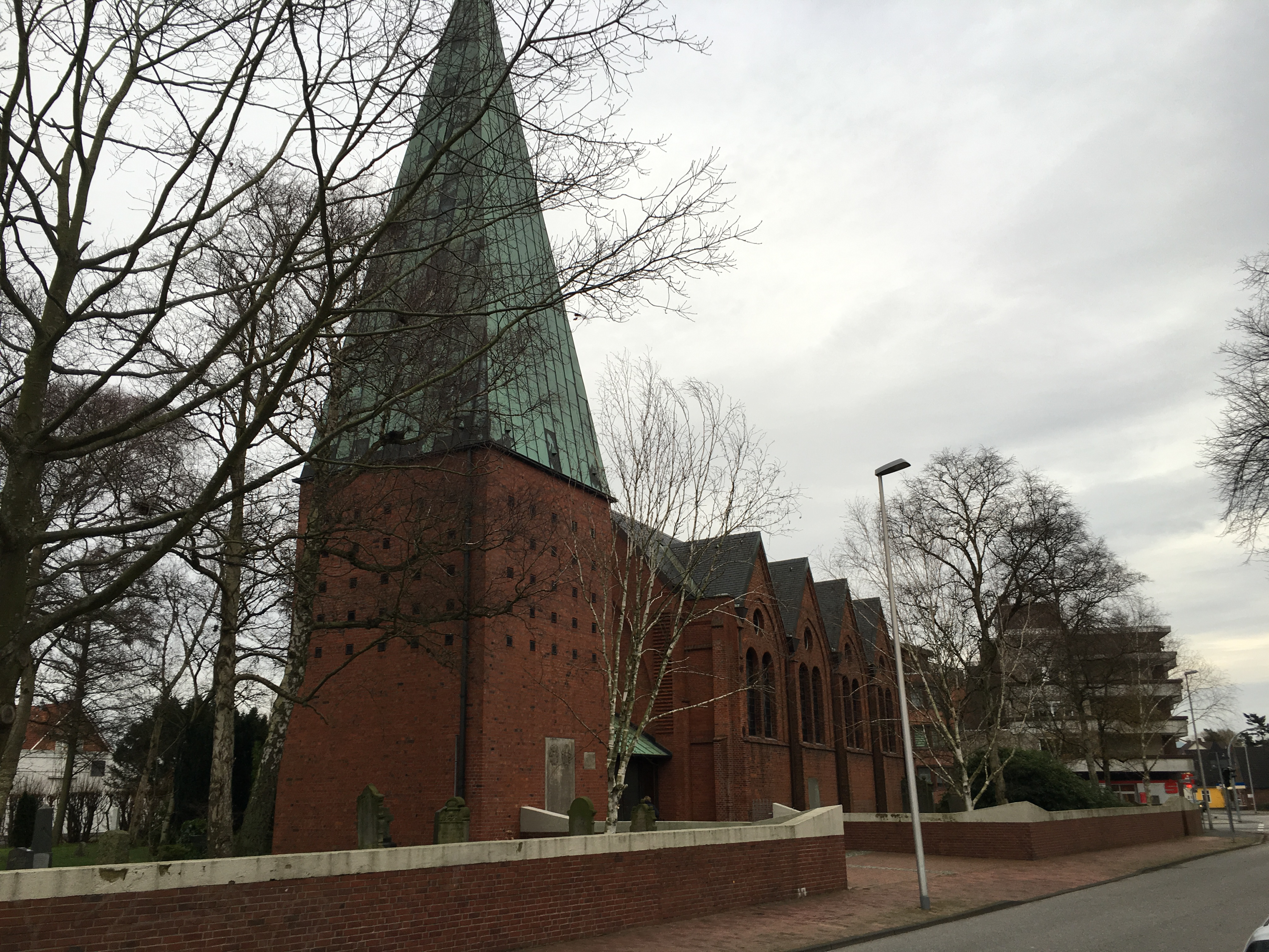 Kark in Döös (Cuxhoben)